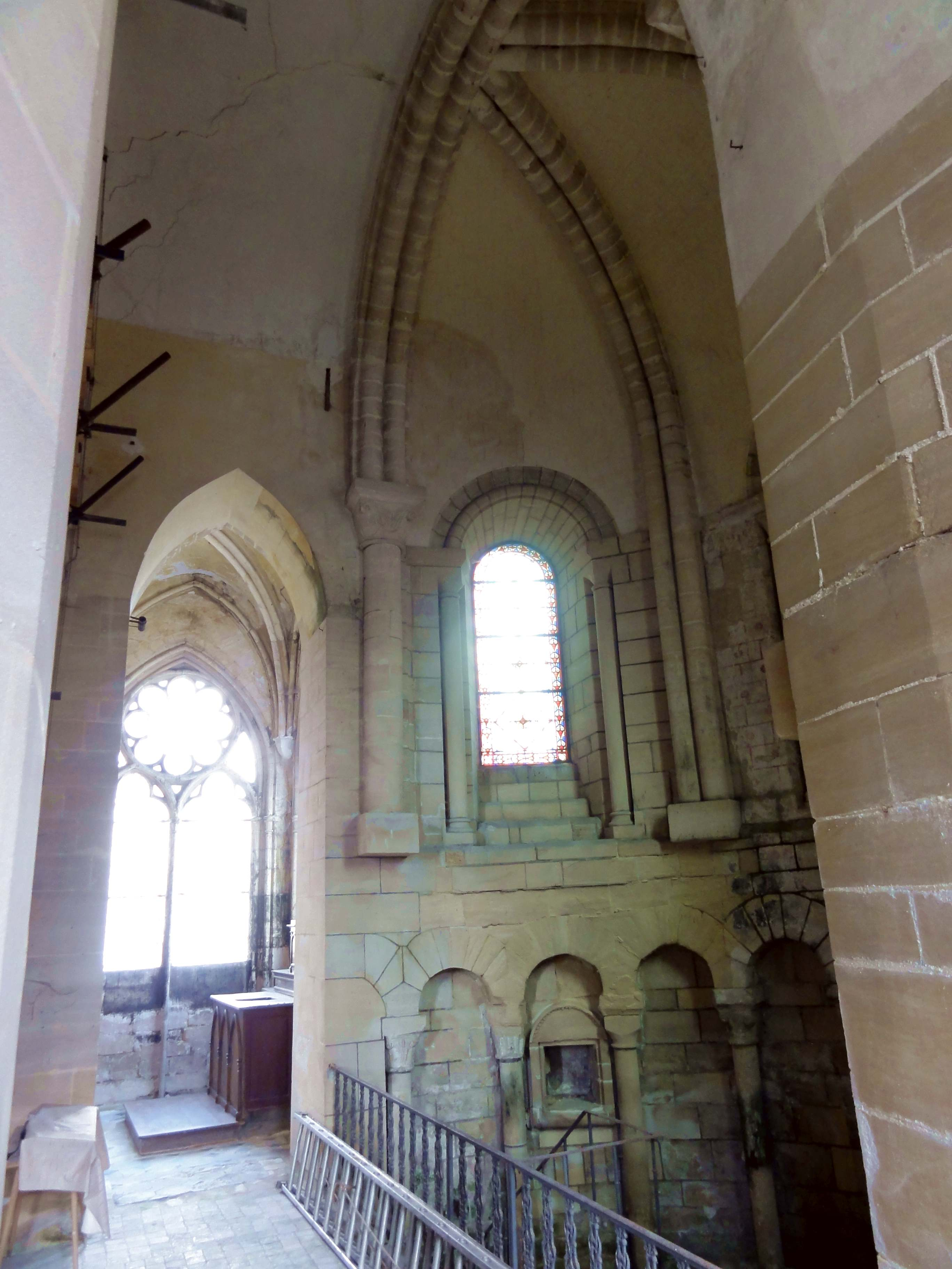 Intérieur de l'église - voir le titre du fichier.